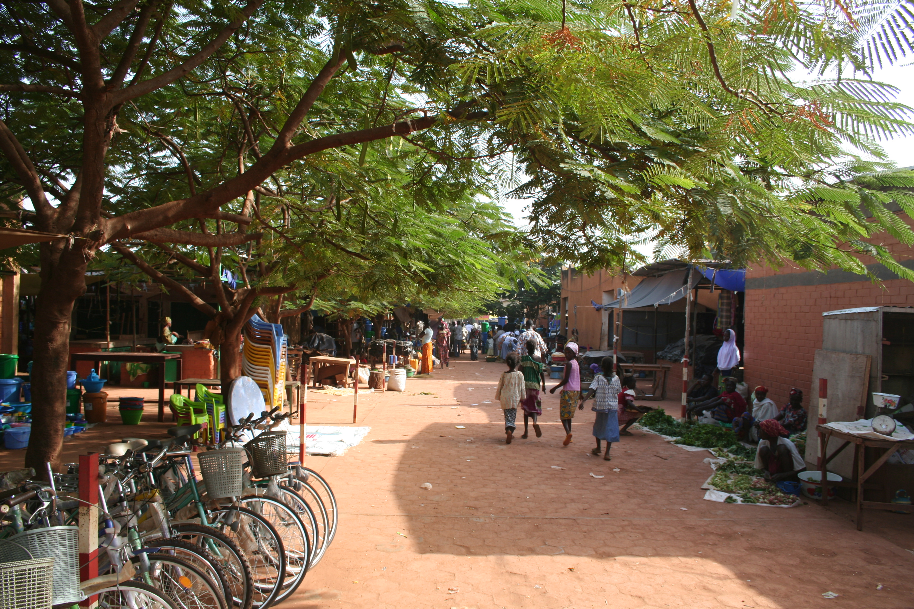 Market of Fada N'Gourma, Burkina Faso